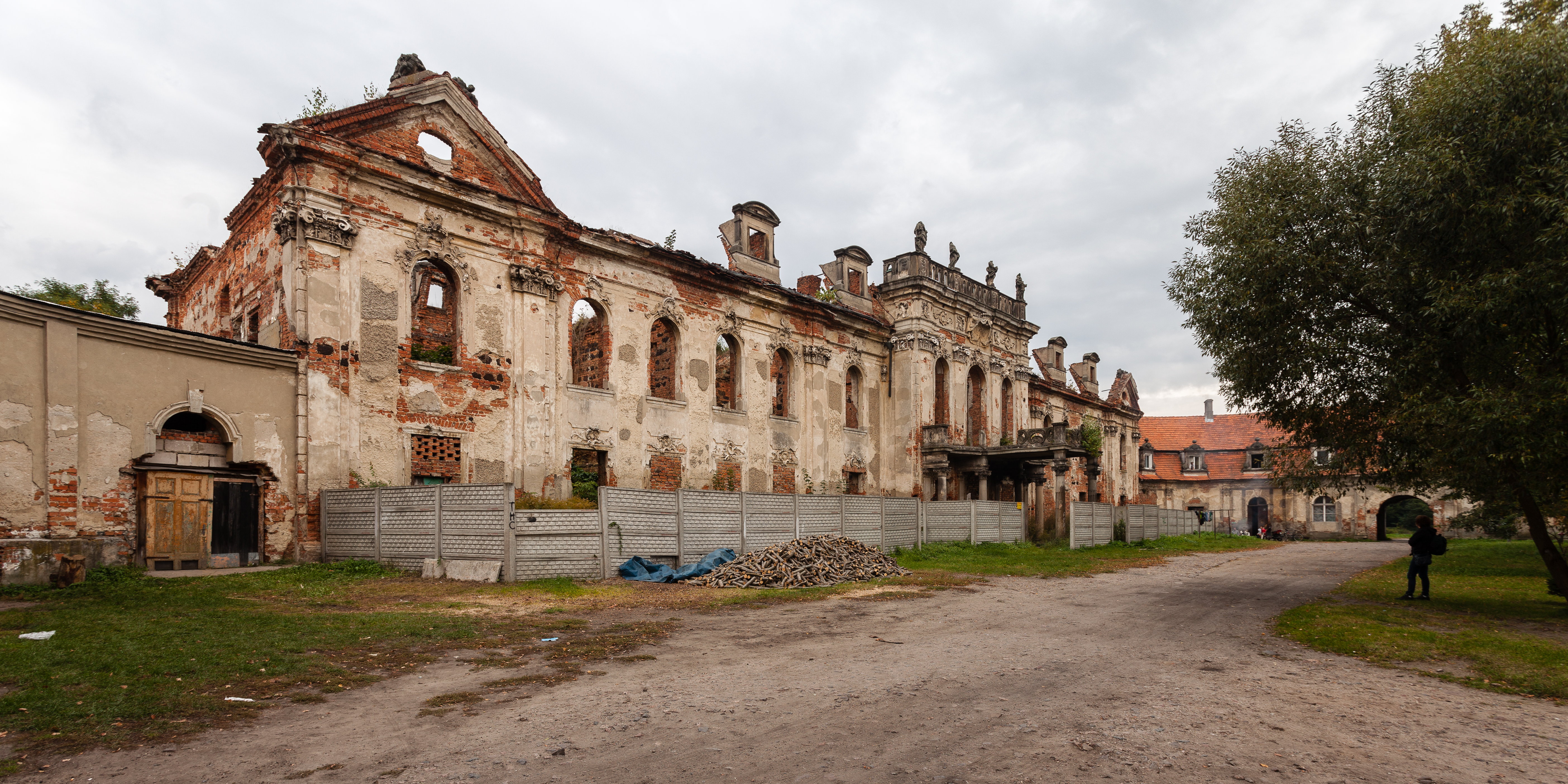 Zespół pałacowy: ruiny palacu